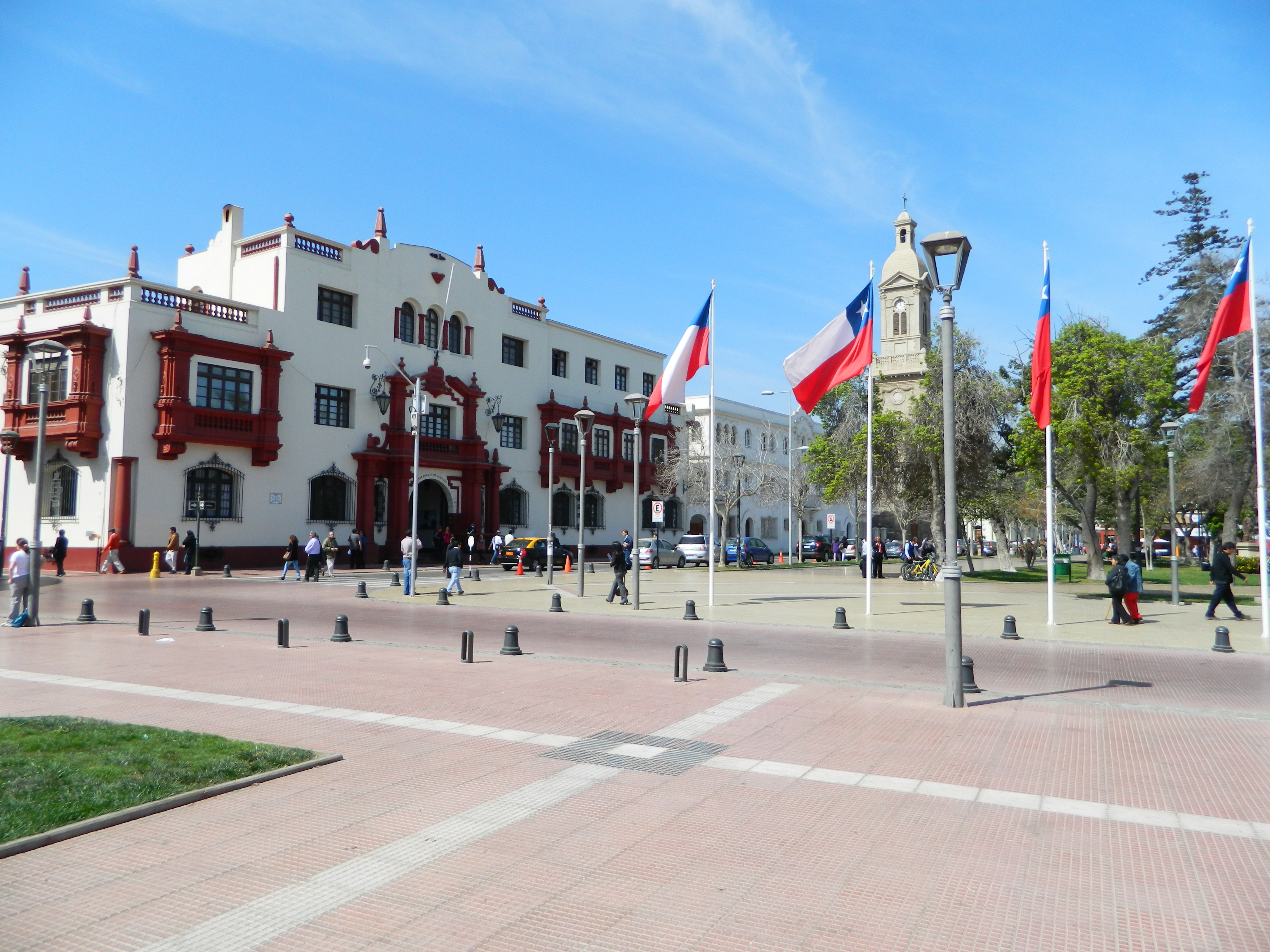 Centro histórico de La Serena This is a photo of a national monument in Chile: 602